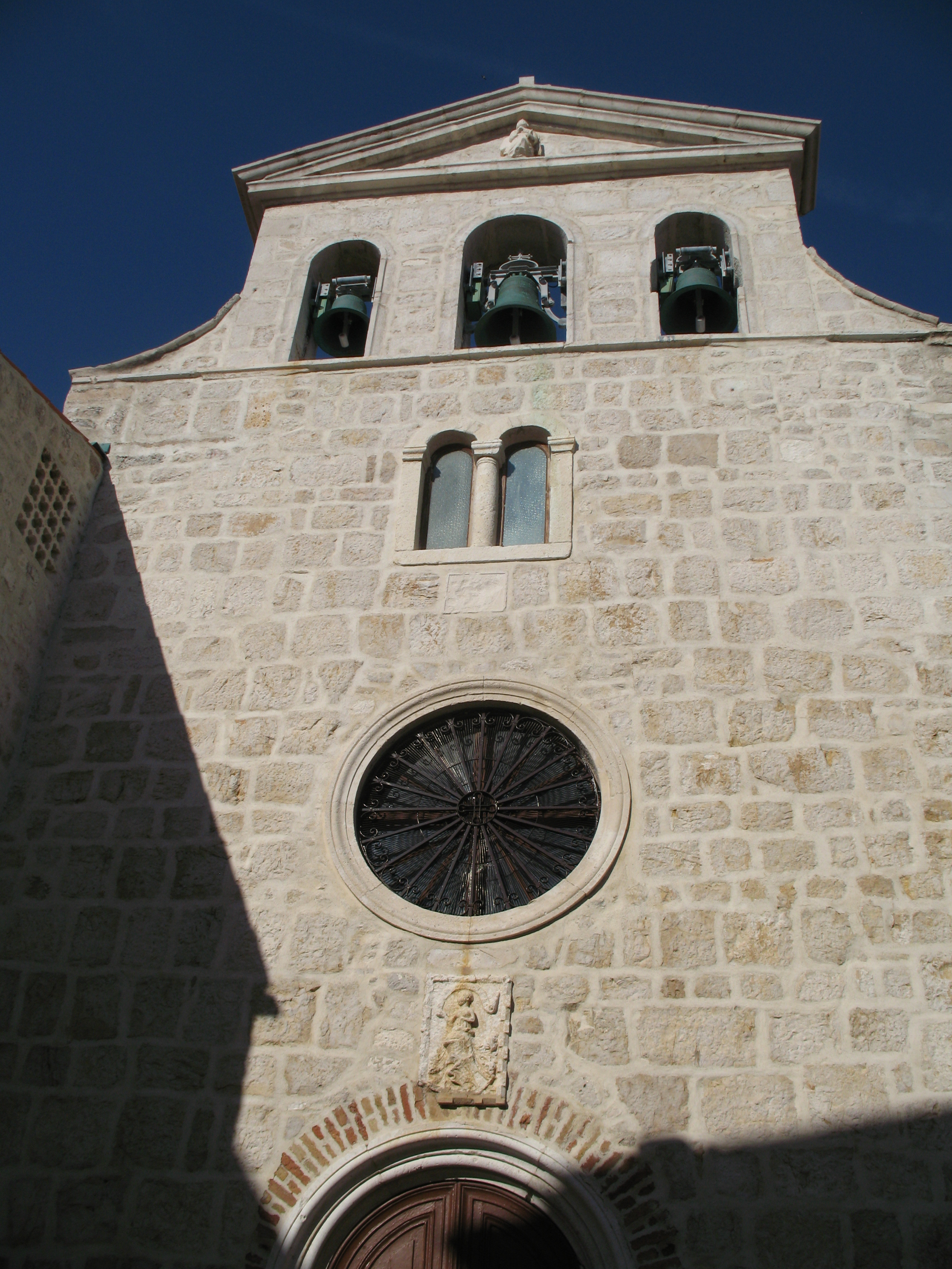 Pag város